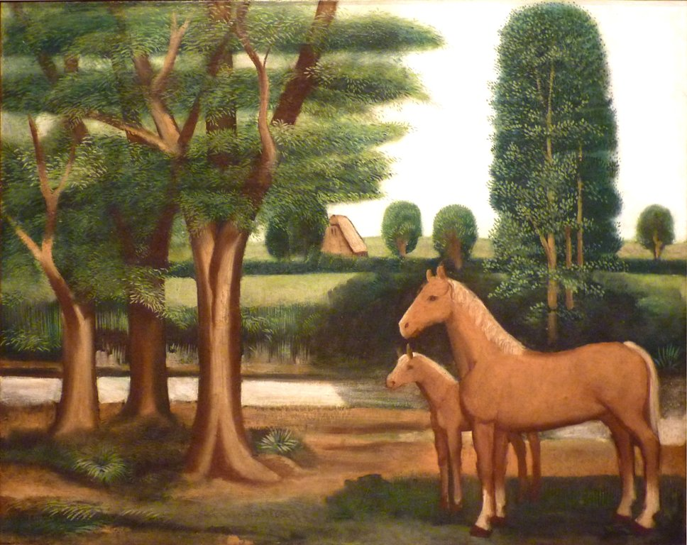 Titel: Pferde und Bäume. Öl auf Leinwand. Maße: 720 x 910 mm